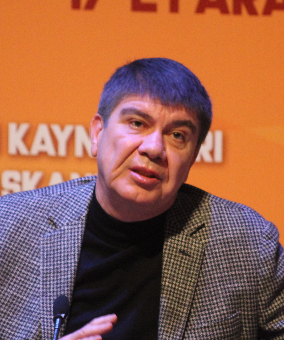 Menderes Mehmet Tevfik Türel, Antalya Büyükşehir Belediye Başkanı. Akdeniz Üniversitesi'ndeki söyleşisinde.